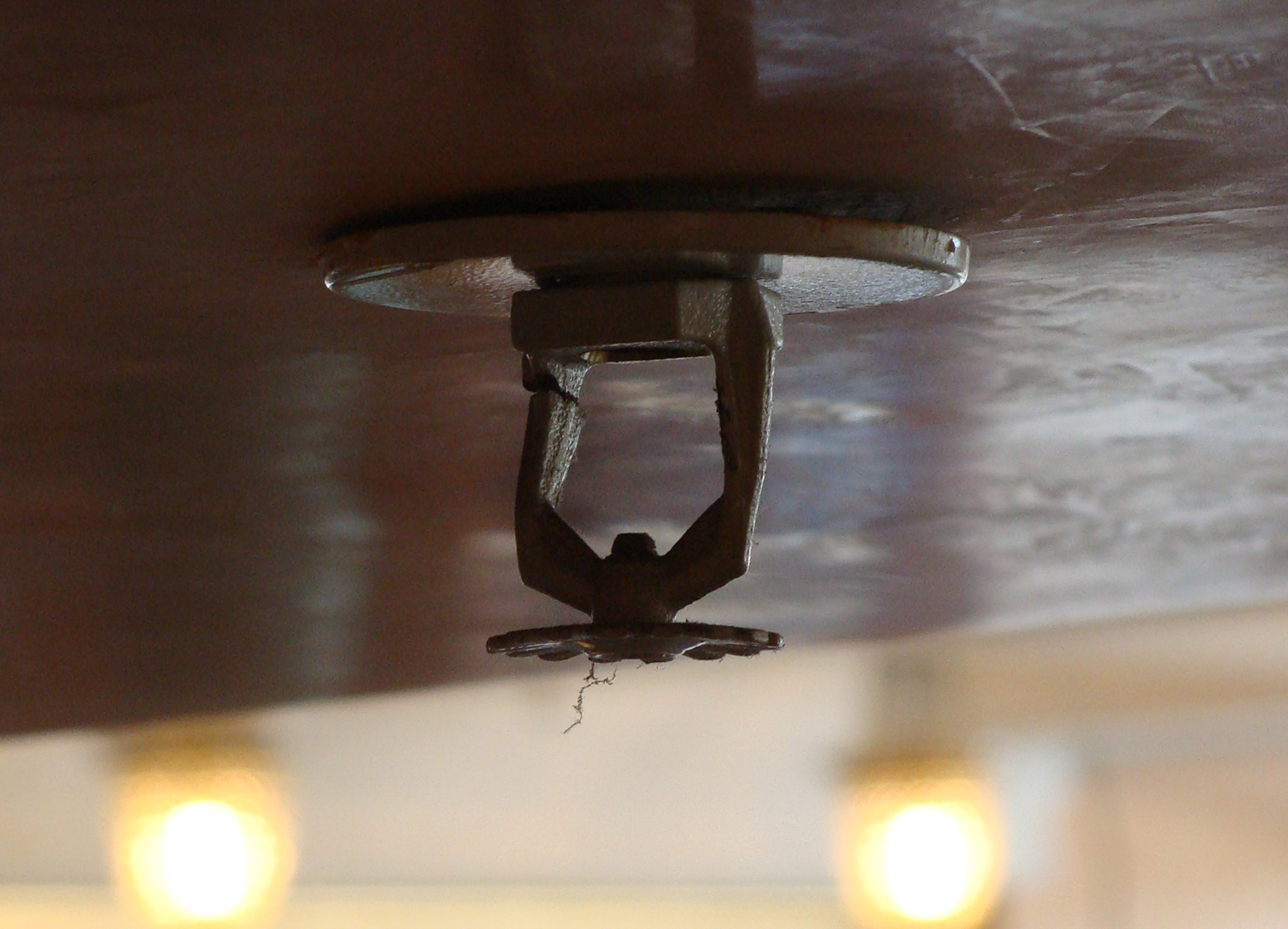 Дренчерный ороситель. Находится в составе дренчерной завесы у лестничной клетки в Доме книги в Санкт-Петербурге